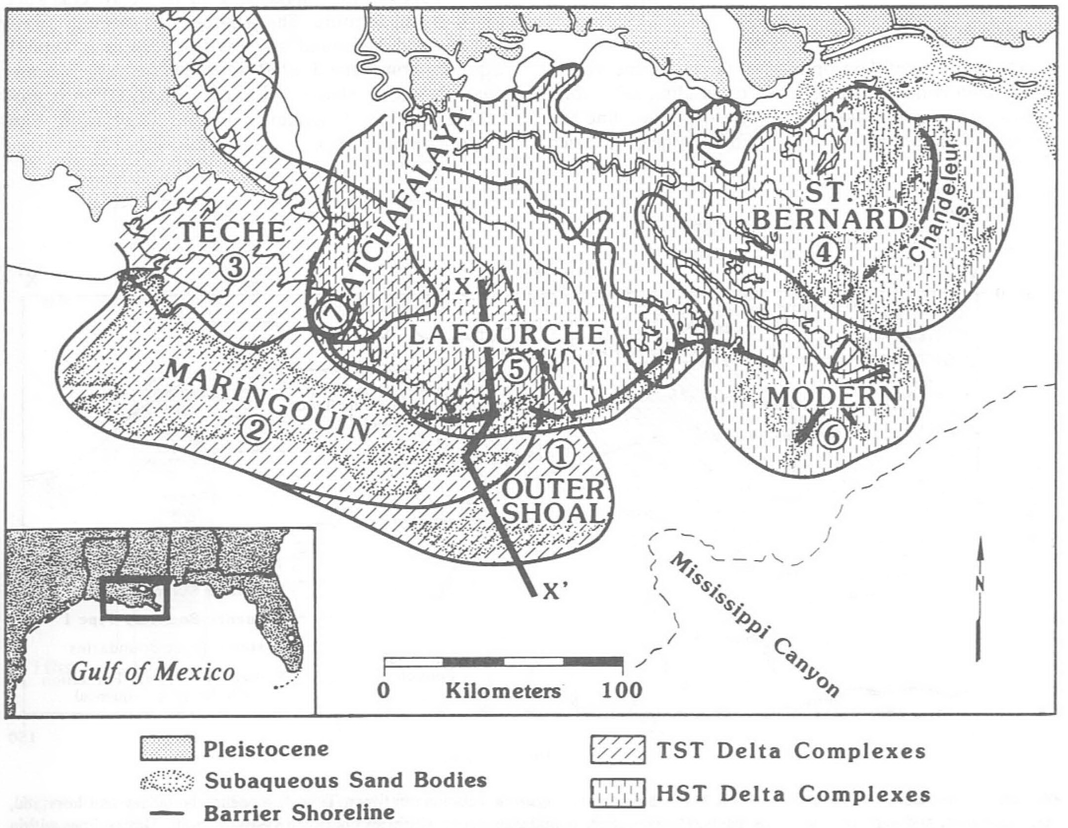 วิวัฒนาการการเปลี่ยนแปลงของดินดอนสามเหลี่นมปากแม่น้ำมิสซิสซิปปี้